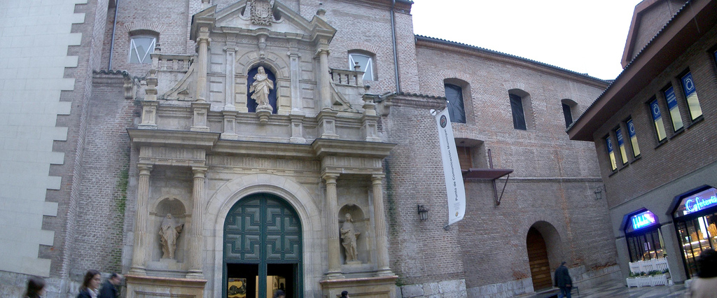 Vista de la fachada de la iglesia de Las Francesas en la calle Santiago de Valladolid, antiguo convento de las Comendadoras de Santa Cruz. La iglesia está dedicada a sala de exposiciones, pero aún pueden contemplarse las yeserías barrocas que cubren su bóveda de cañón, y losbalcones tribunas, de hierro, a lo largo de su única nave